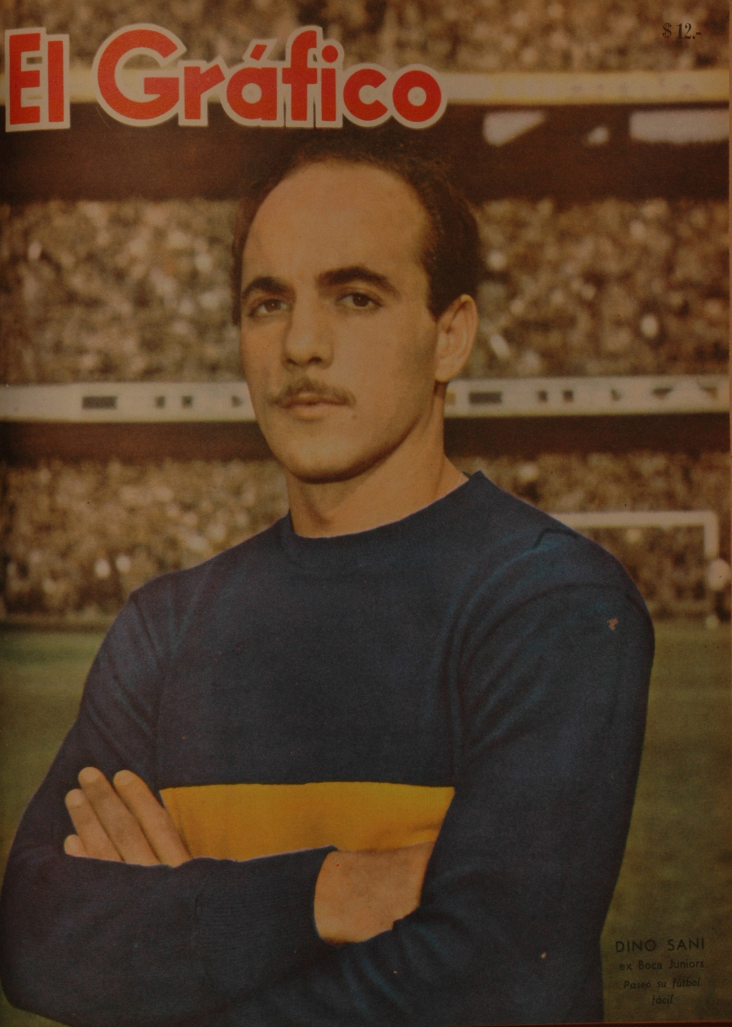 El Gráfico del 20 de Diciembre de 1961. Edición 2202.